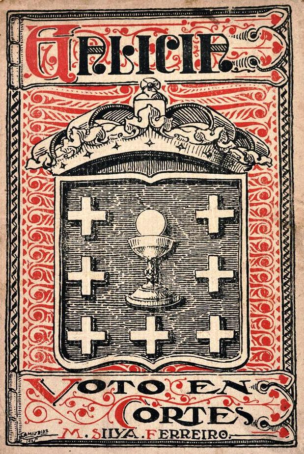 Galicia, voto en cortes de Manuel Silva Ferreiro, Santiago de Compostela